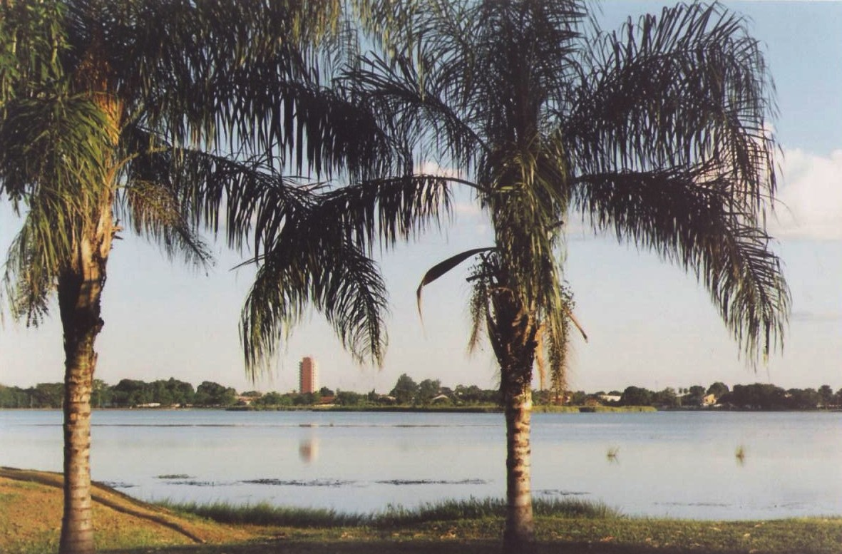 Descrição: Lagoa Maior em Três Lagoas, Mato Grosso do Sul, Brasil. 2007.